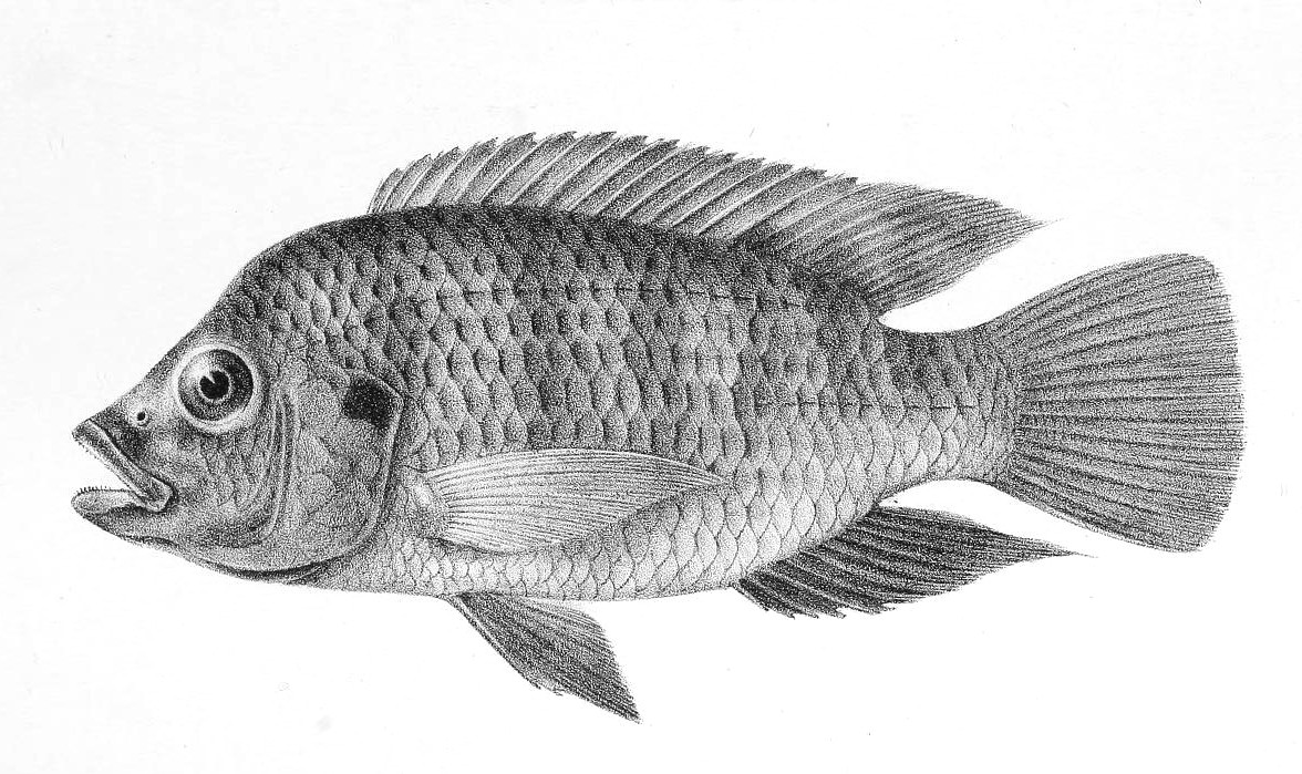 Chromis busumanus=Tilapia busumana